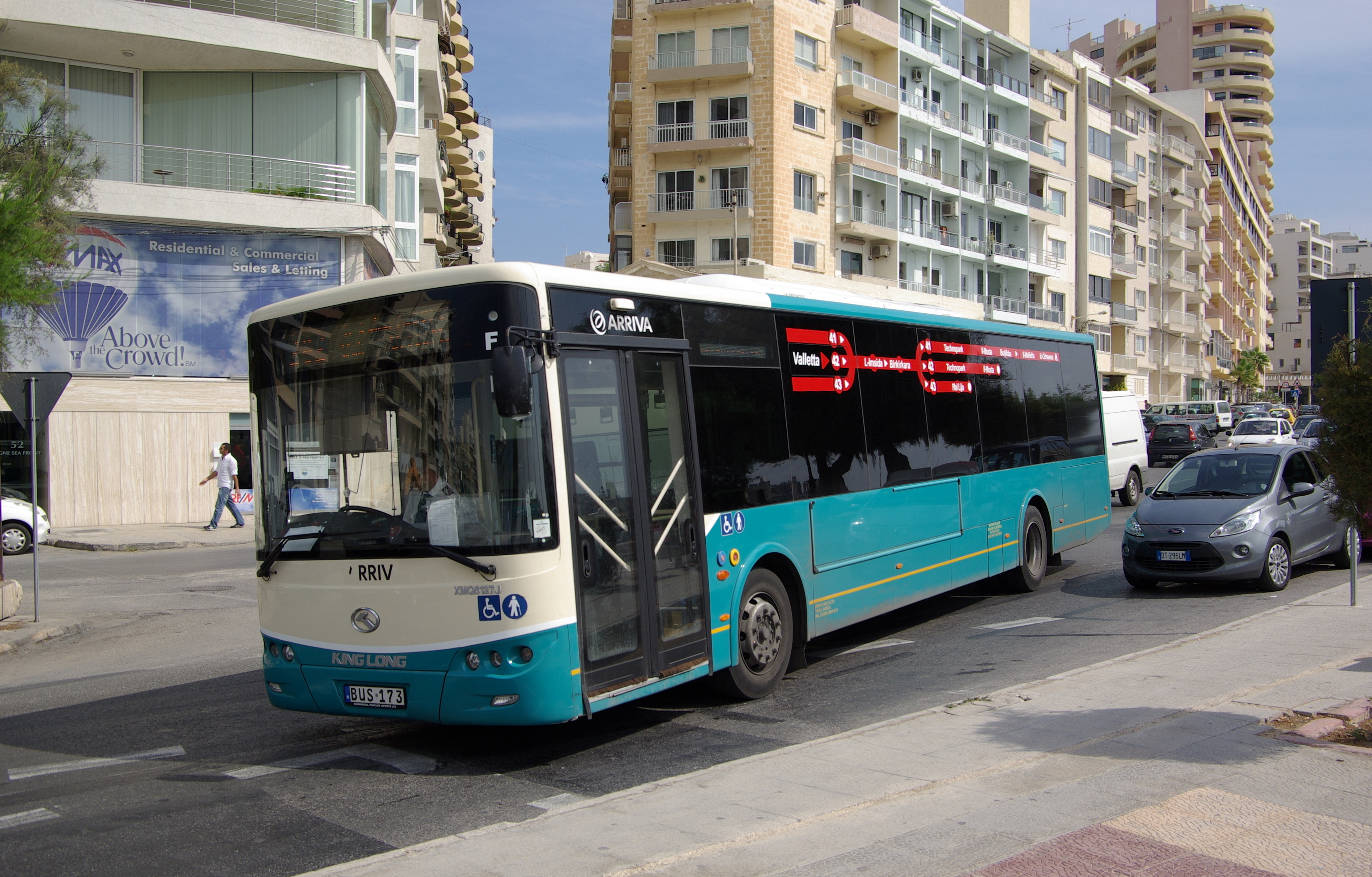 Malta, Bus, im Sommer 2011 wurden die gelb-roten Oldtimer Busse durch diese Modernen abgelöst